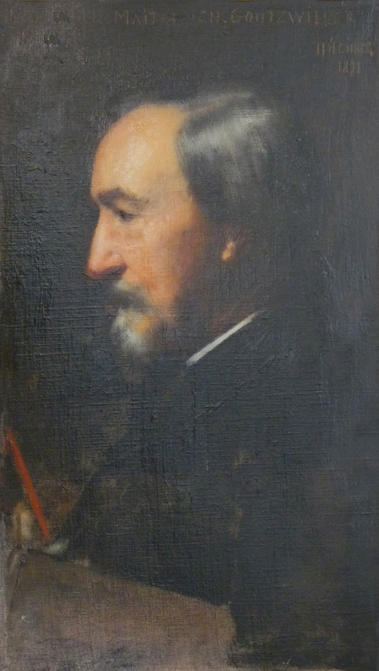 Portrait de Charles Goutzwiller par Jean-Jacques Henner qui fut son élève, 1891, Musée sundgauvien